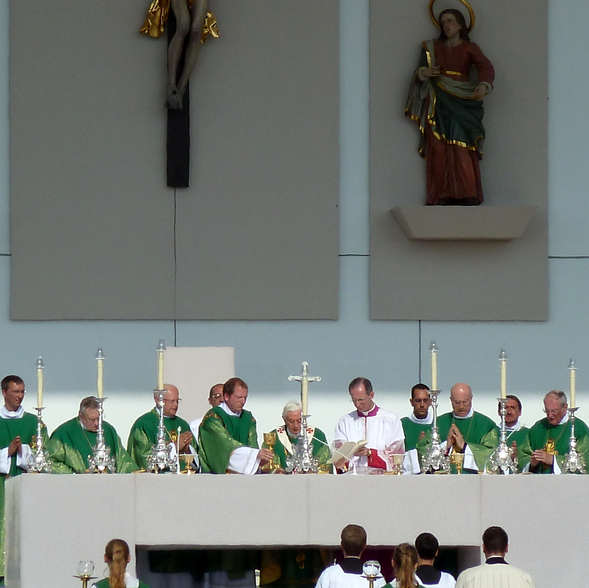 Benedikt XVI. bei der Eucharistiefeier der päpstlichen Sonntagsmesse in Freiburg.